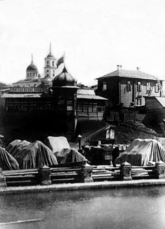 Самара. Набережная Волги. На заднем плане Вознесенский собор.